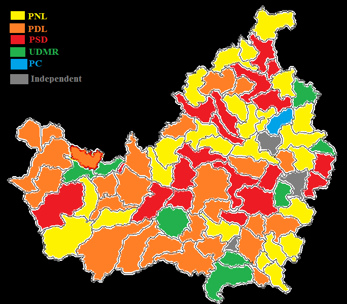 Harta politica Cluj-Napoca